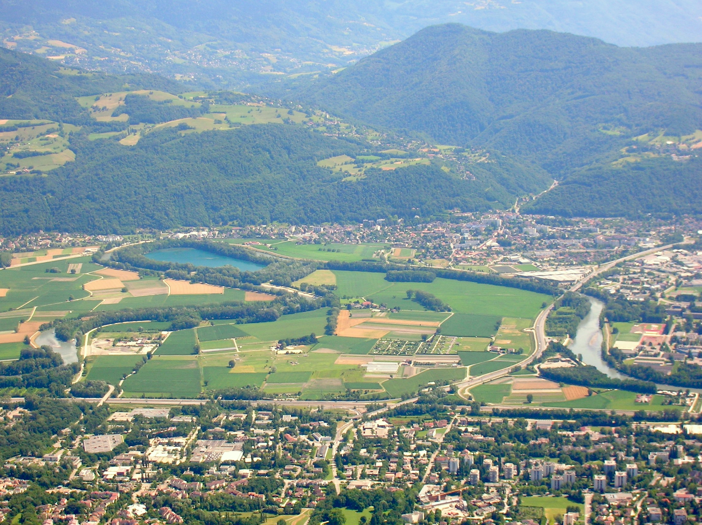 Vue générale de l'agglomeration grenoblois depuis le Fort St Eynard, Le Sappey-en-Chartreuse, Isère, France. En haut : Murianette, le Lac de la Taillat, Gières. En bas : Meylan.